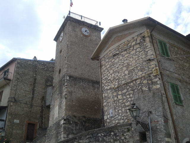 La torre dell'orologio a Rocca di Botte